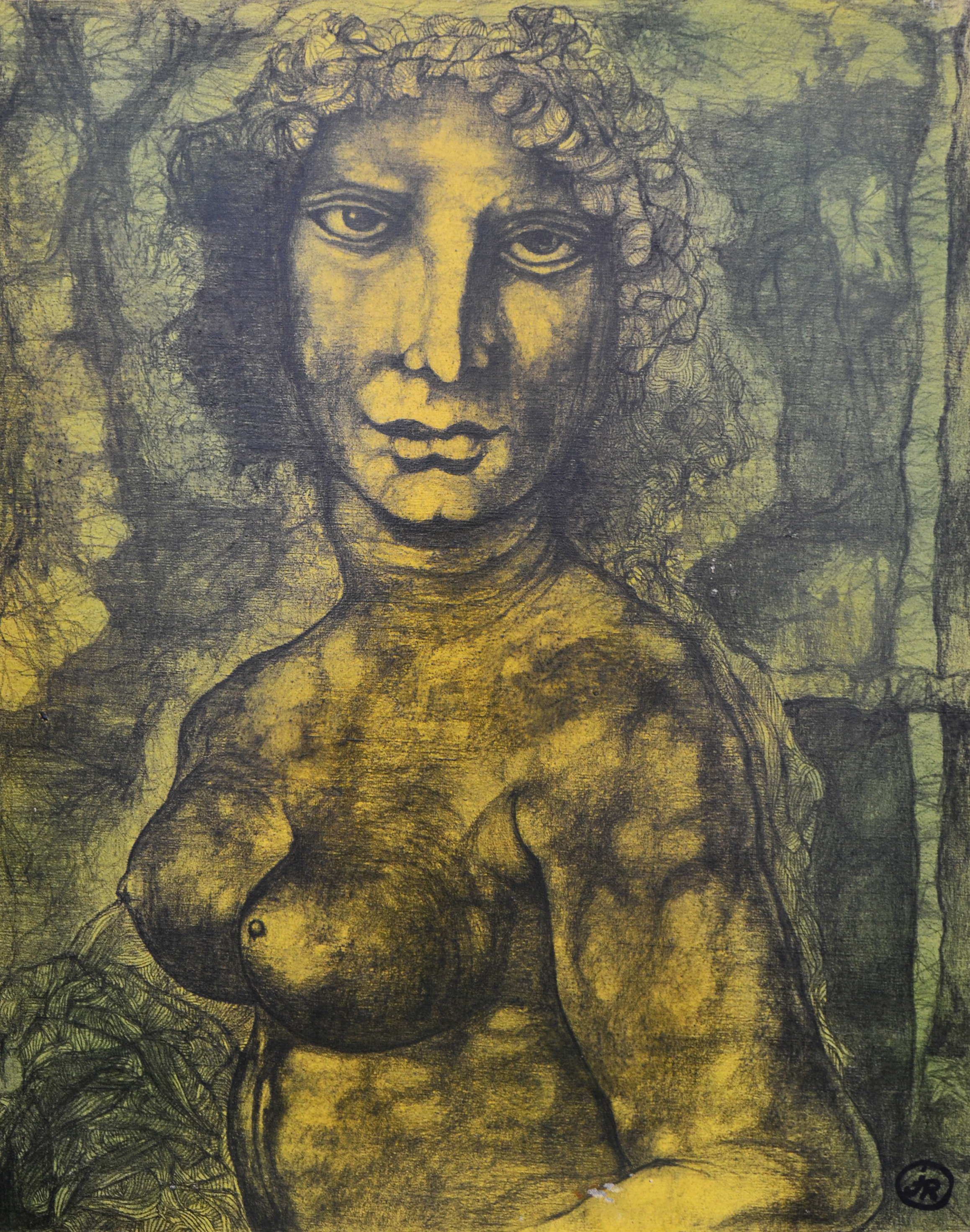 Obra realizada por Joan Ramos empleando técnica mixta en la década de 1980